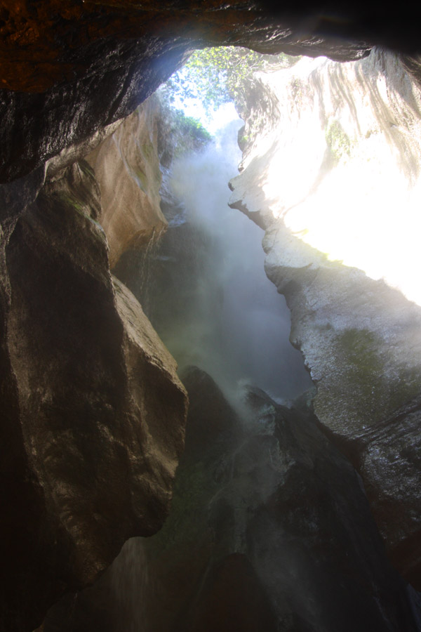 Grotta della Cascata del Varone, Tenno (TN)